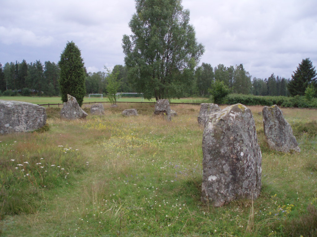 Gravfältet Smålandsstenar (RAÄ-nummer Villstad 52:1) i nordöstra delen av samhället Smålandsstenar, Gislaveds kommun, Jönköpings län, Småland, Sverige.